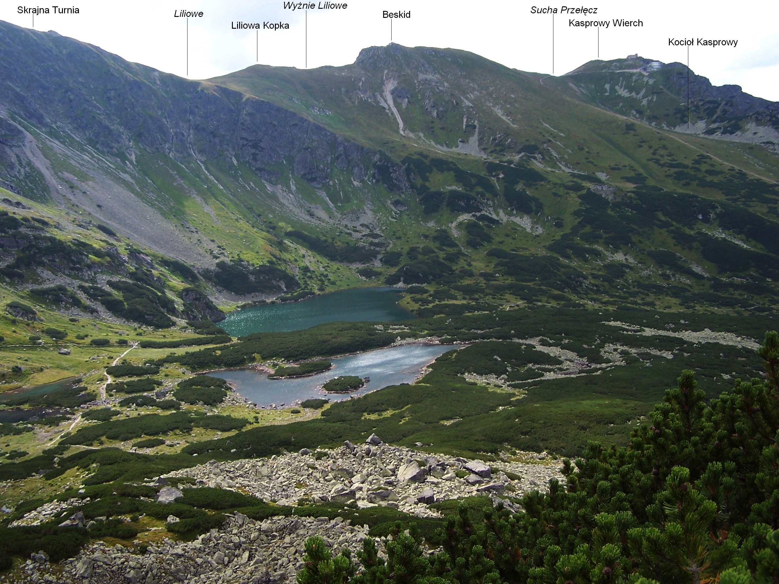 Zielona Dolina Gąsienicowa i fragment grani głównej